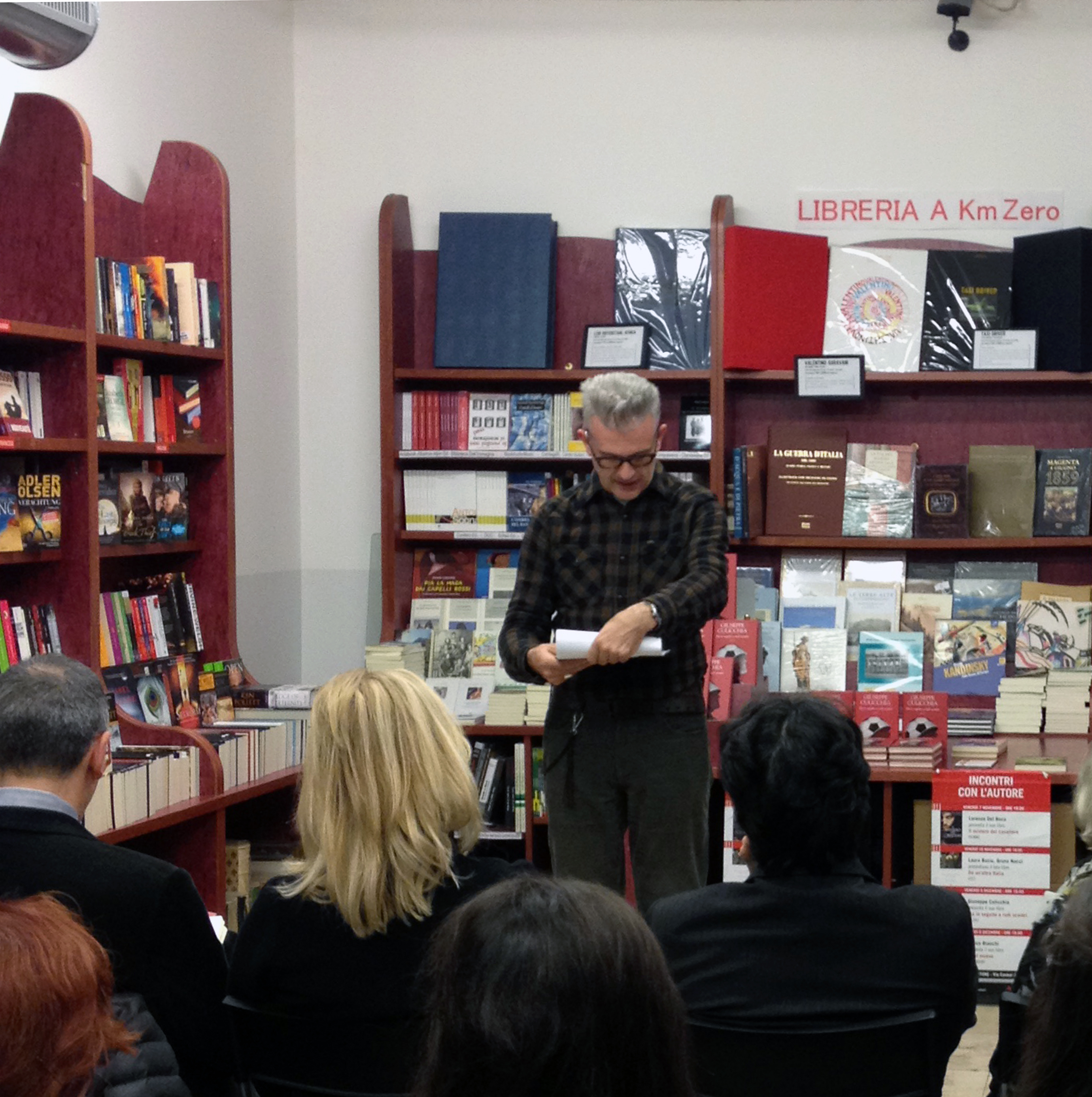 L'écrivain Giuseppe Culicchia en public, décembre 2014